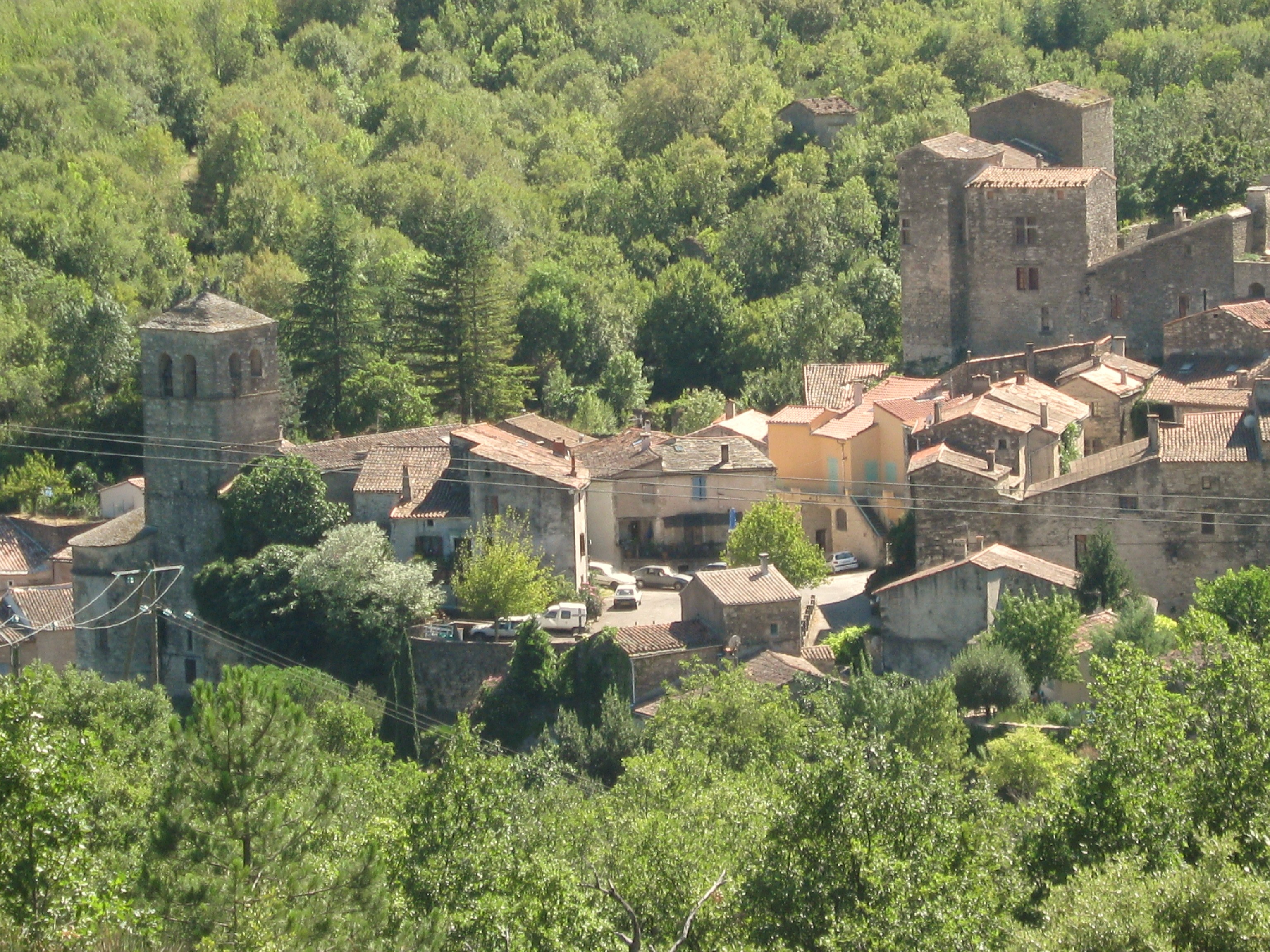 vue sur la place du village, du castel bas et de l'eglise. On distingue aussi au milieu, les cables du fameux téléphérique de Boussagues